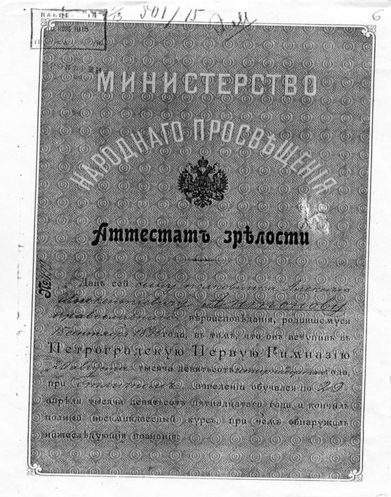 Титульный лист гимназического аттестата Антонова, Алексея Иннокентьевича, выданного ему в 1-ой Санкт-Петрбургской гимназии в 1915 году